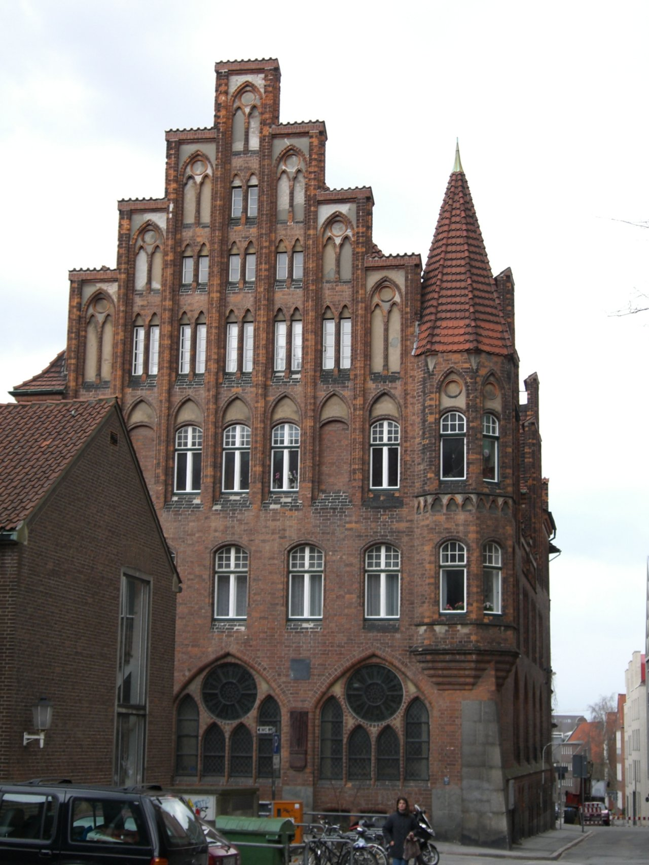 Marienwerkhaus zu Lübeck (eigene Aufnahme)